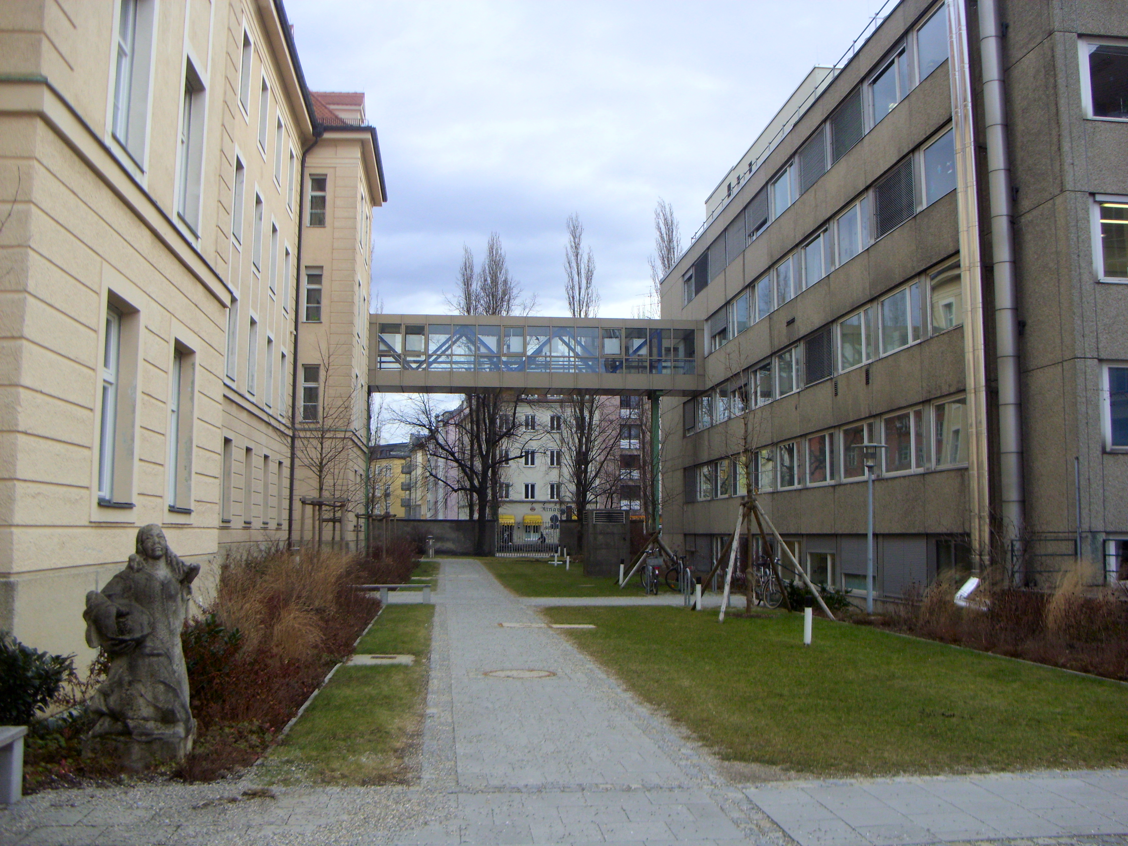 Gebäudeübergang am Dr. von Haunerschen Kinderspital